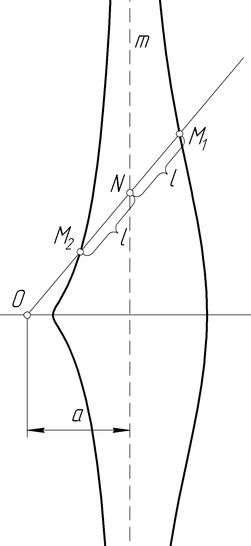 Построение конхоиды Никомеда